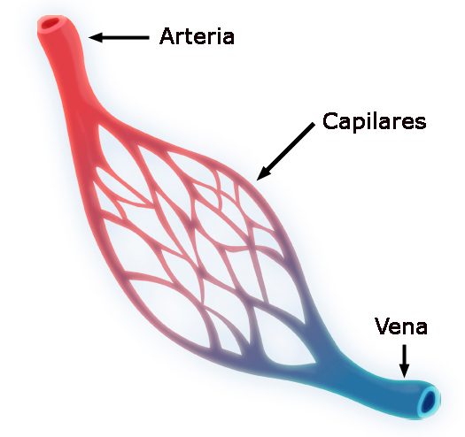 Esquema en el que se muestran los tres tipos de vasos sanguíneos: arteria, capilar y vena.